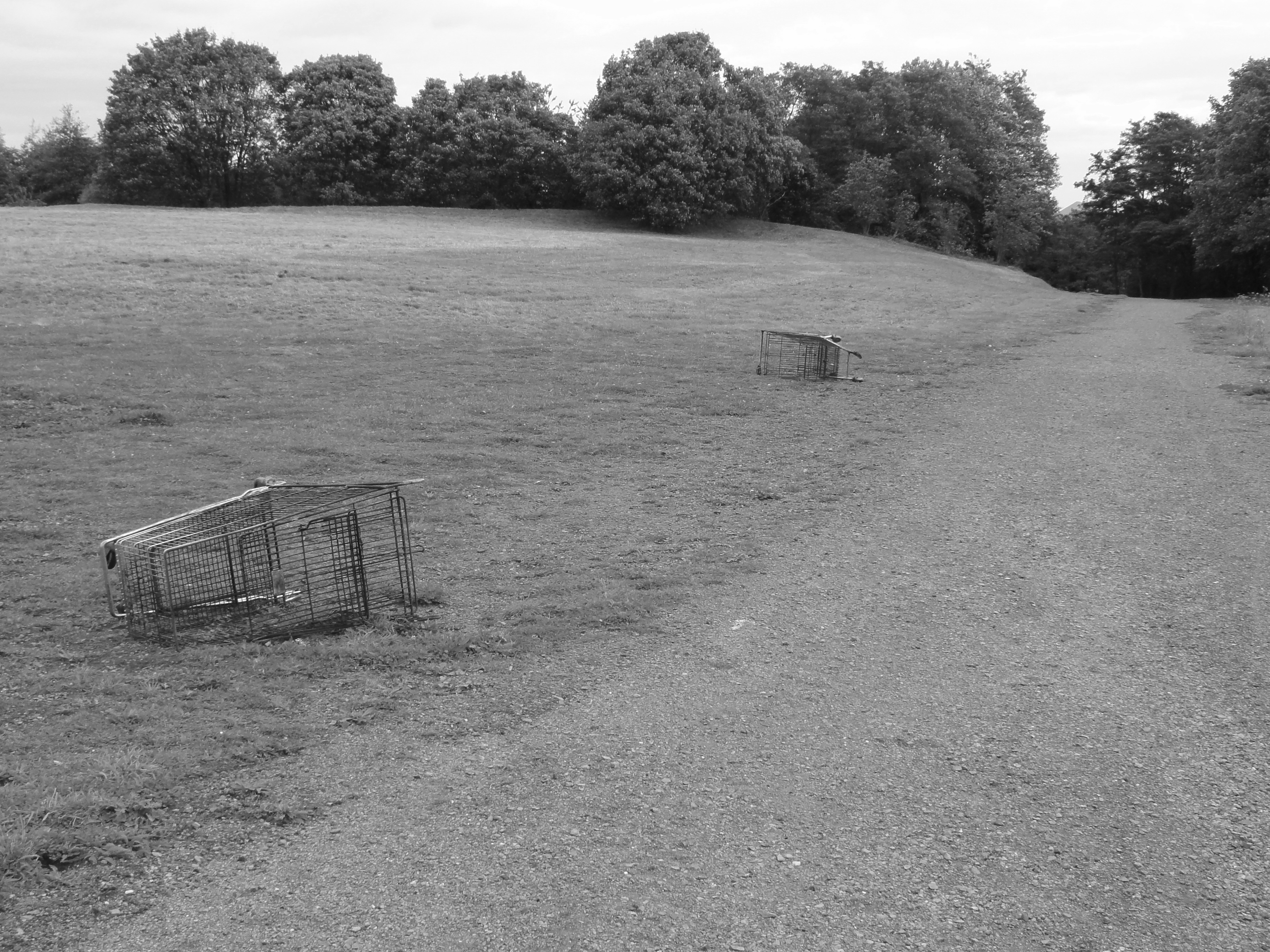 Terril n° 81A dit 5 de Lens Ouest, Fosse n° 5 - 5 bis de la Compagnie des mines de Lens, Lens, Pas-de-Calais, Nord-Pas-de-Calais, France.